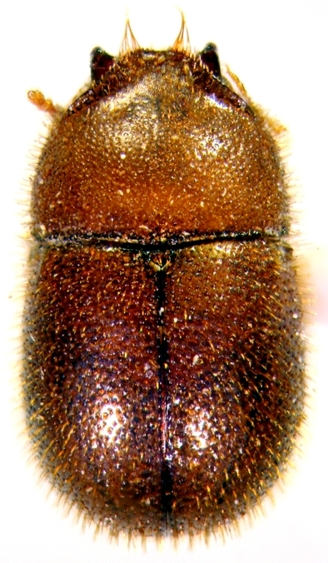 Foto dorsal do holótipo de Falsocis brasiliensis Lopes-Andrade, espécie brasileira de Ciidae ameaçada de extinção. Autor da foto: Cristiano Lopes-Andrade